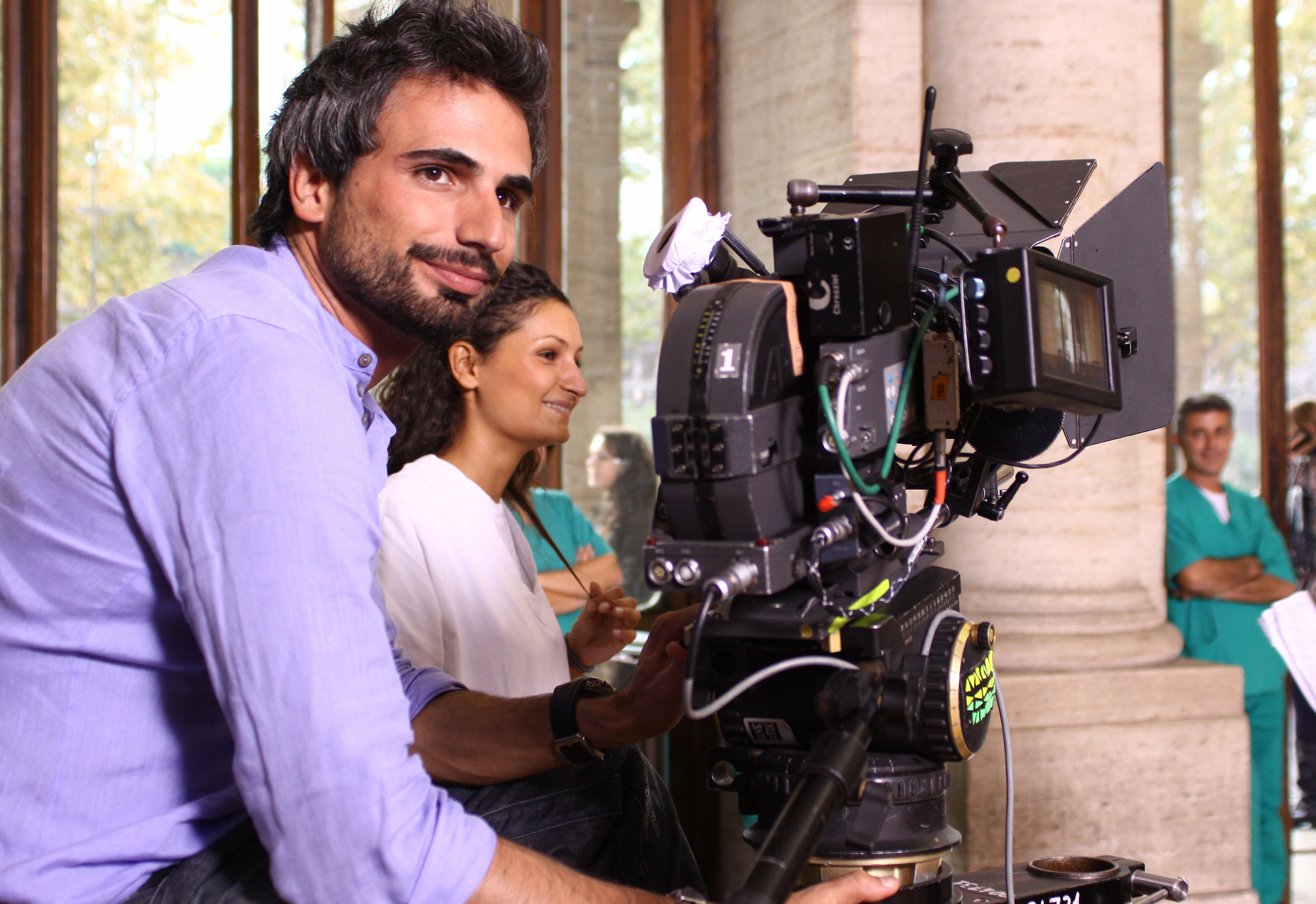 Dario Acocella sul set